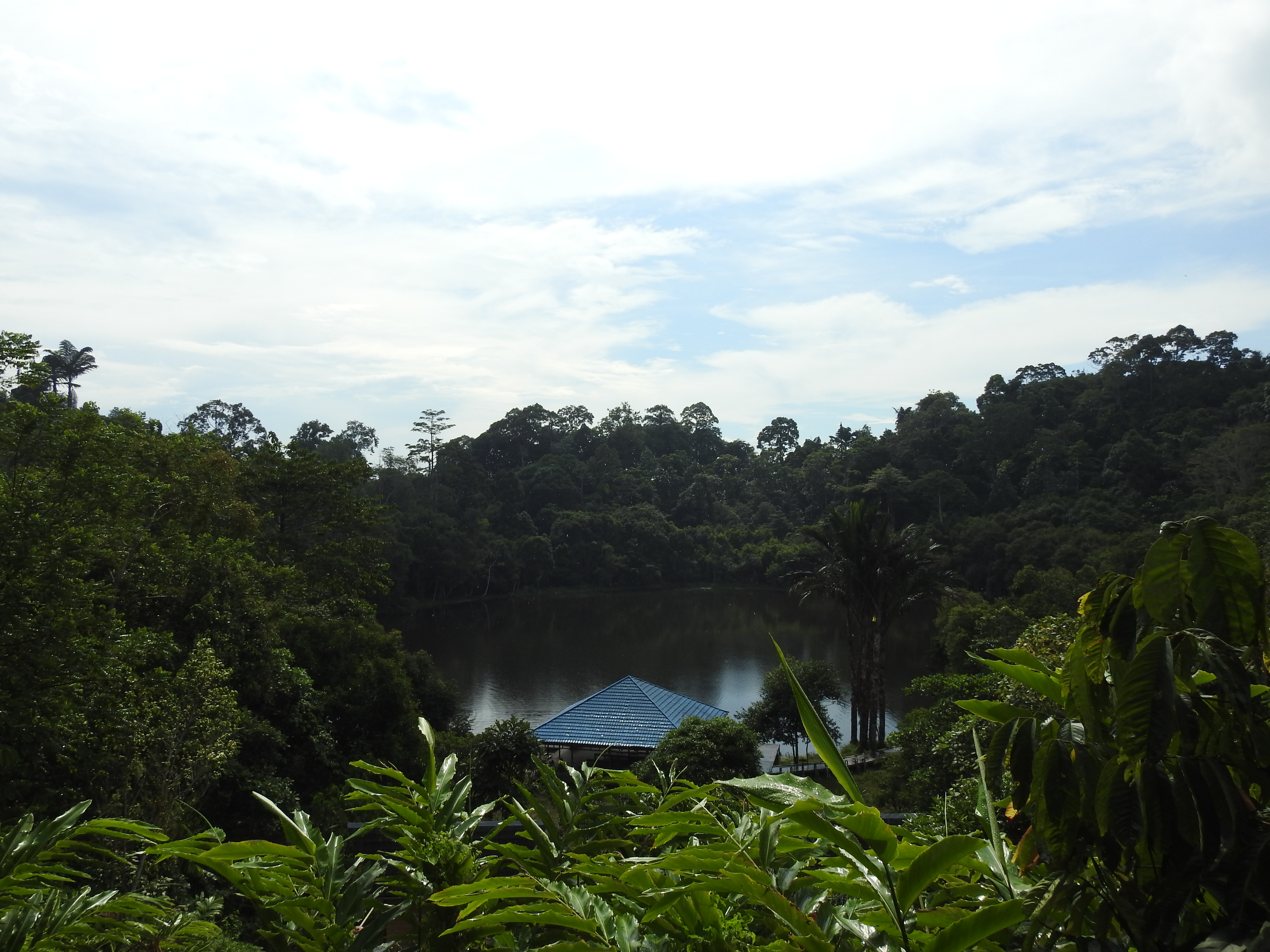 Danau Aco